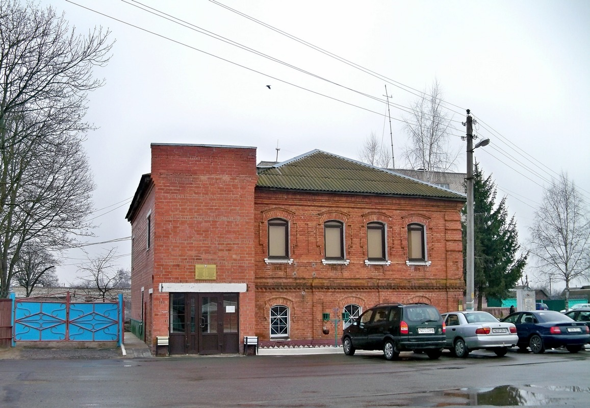 Хоцімск. Вуліца Дзяржынскага, 15